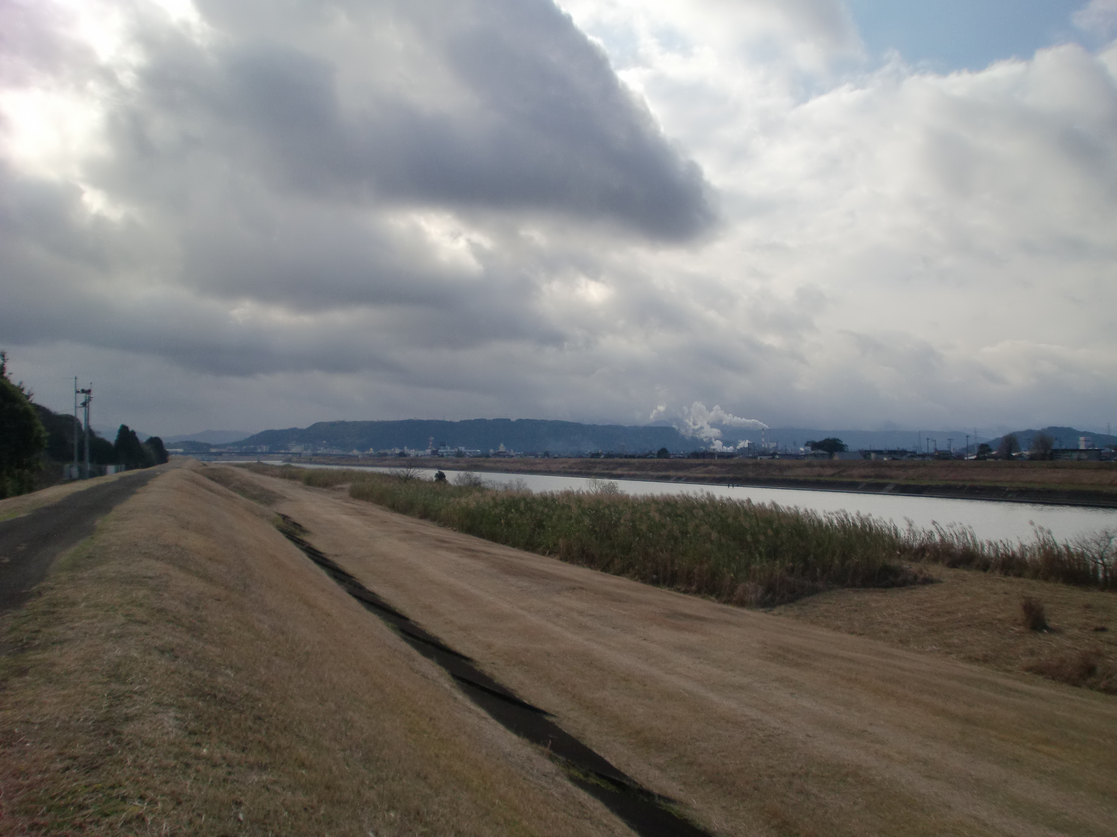 川内川を薩摩川内市天辰町から河口方向に望む。